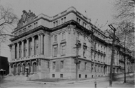 Ancien immeuble de HEC Montréal - carré Viger